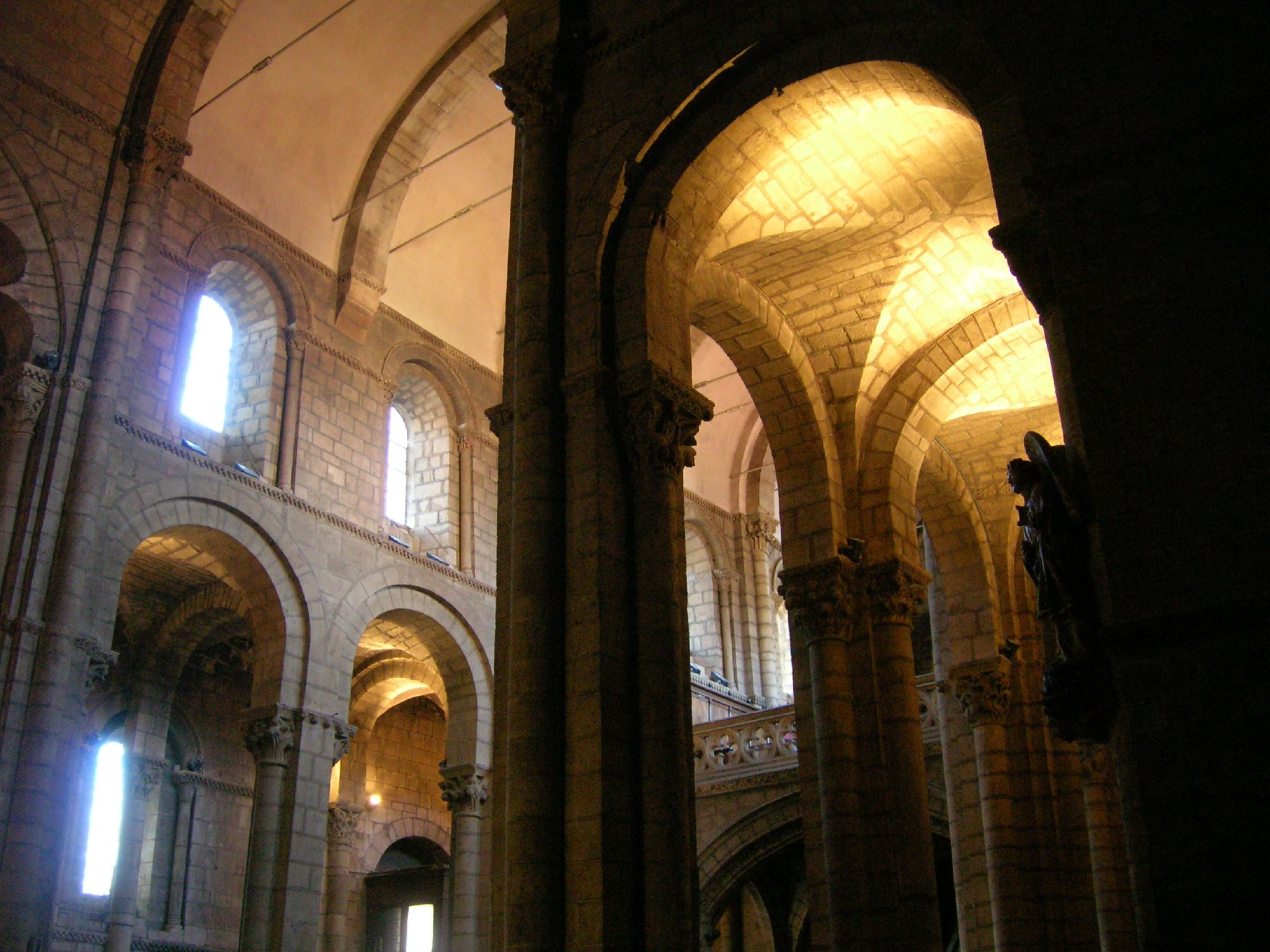 Interior de la Basílica de San Isidoro de León